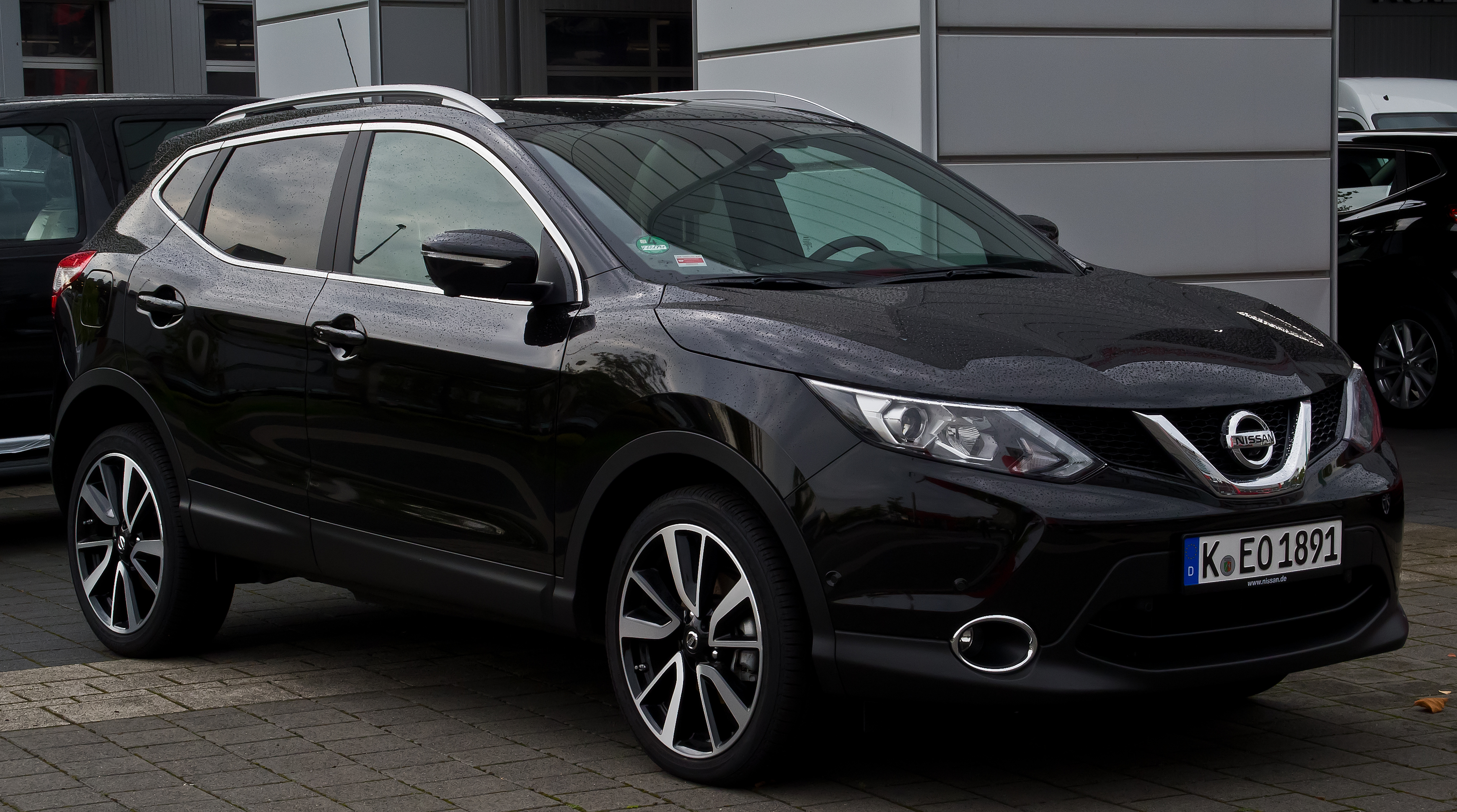 Nissan Qashqai Tekna (II)